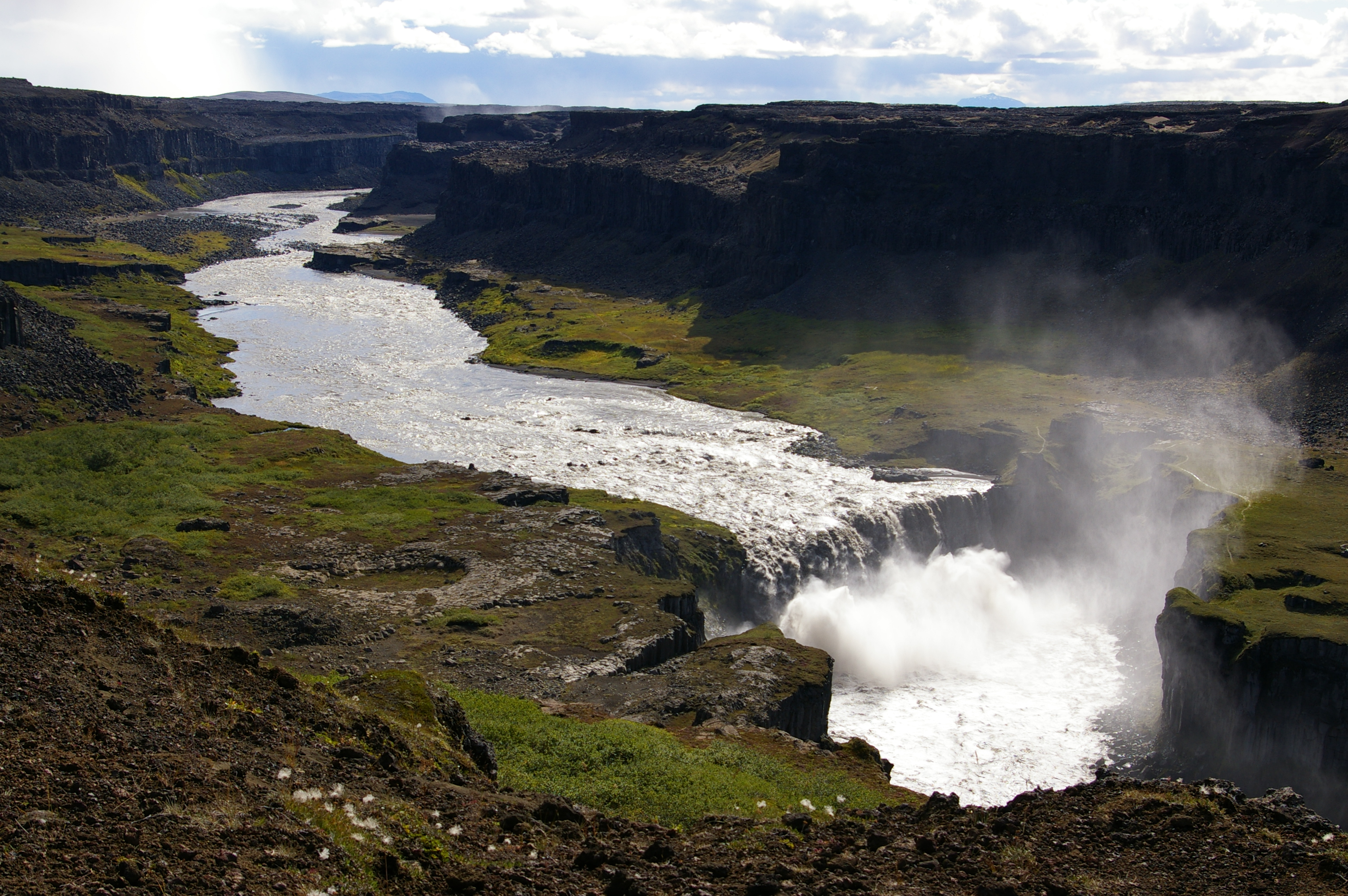 Hafragilsfoss waterfall